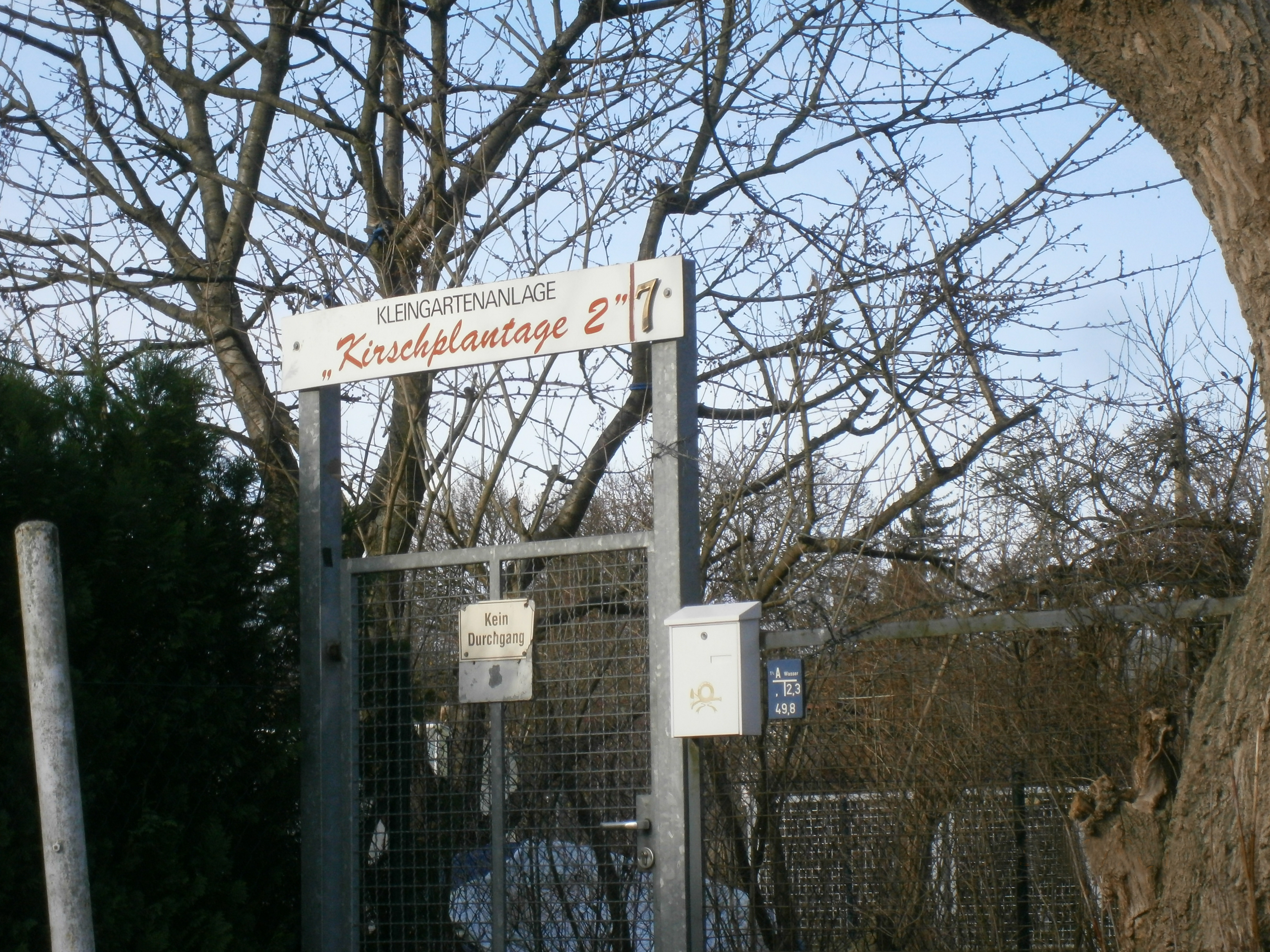 Waldemarstraße ist eine Straße in Berlin-Niederschönhausen. Der Blick am Nordende der Straße zur KGA Kirschplantage Ecke Rosenthaler Grenzweg.